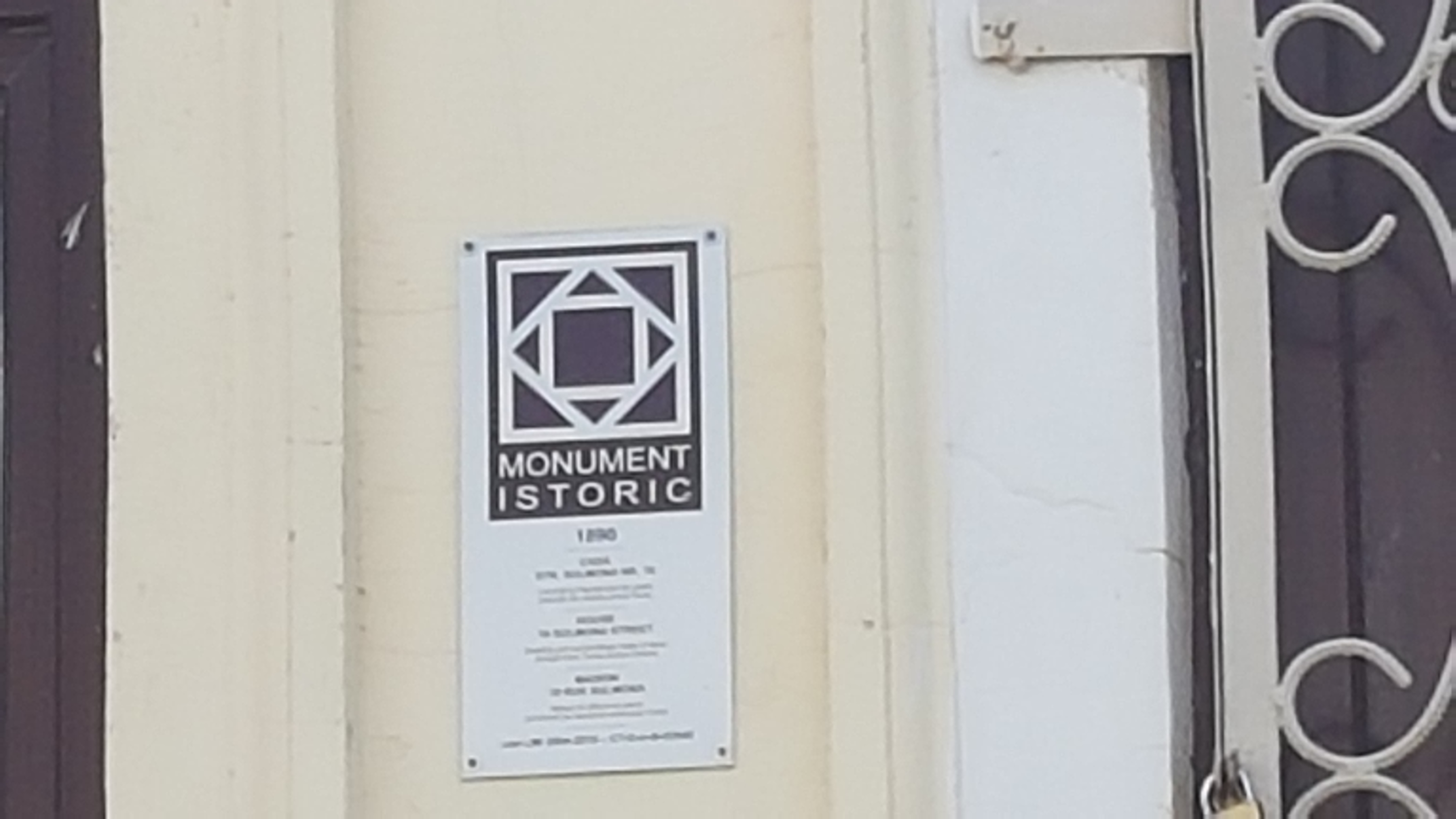 Grădinița nr. 16